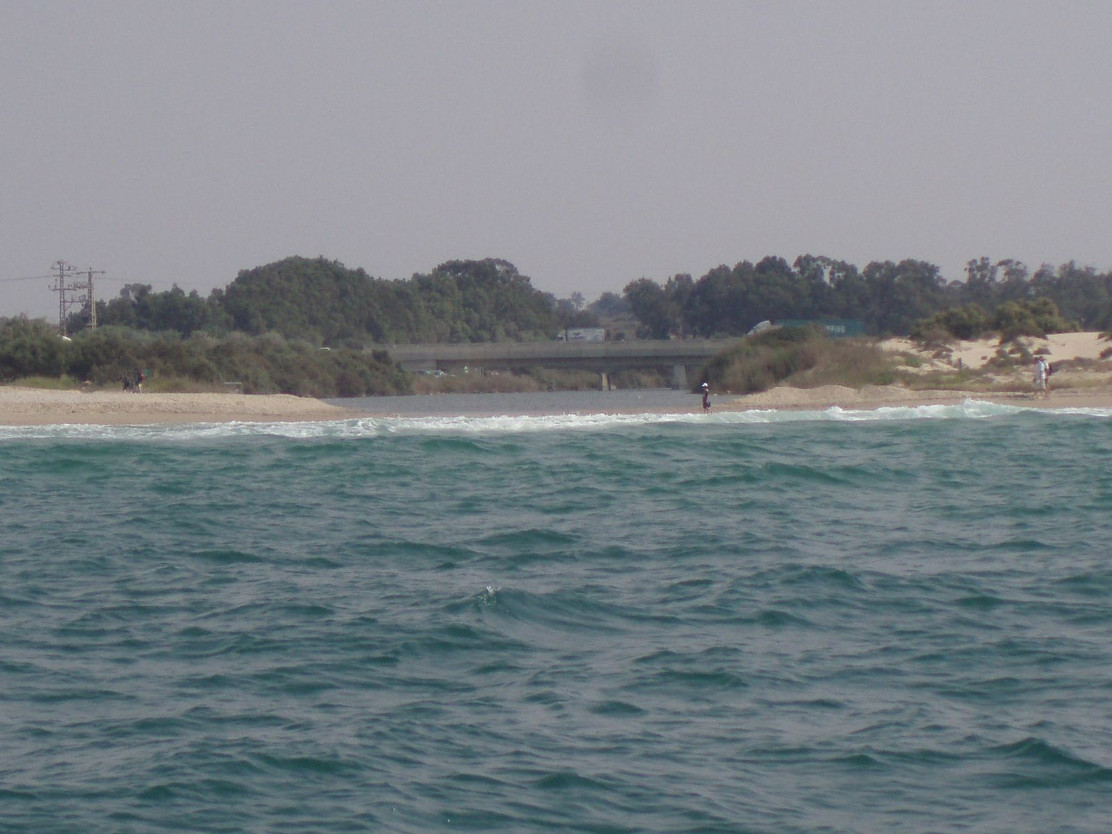 שפך נחל אלכסנדר, צילום מהים.